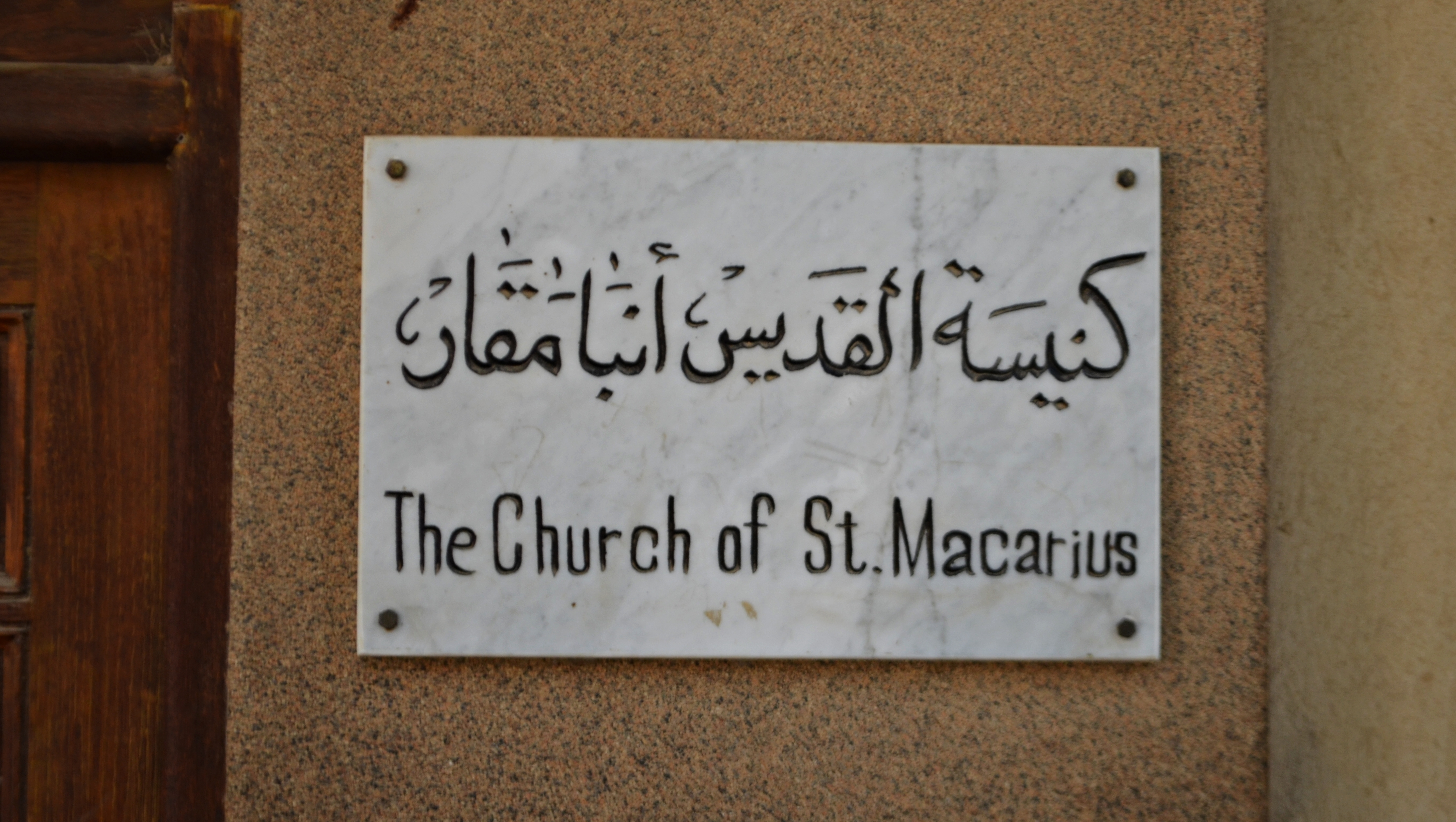 دير القديس الأنبا مقار الكبير، وادي النطرون، محافظة البحيرة، مصر